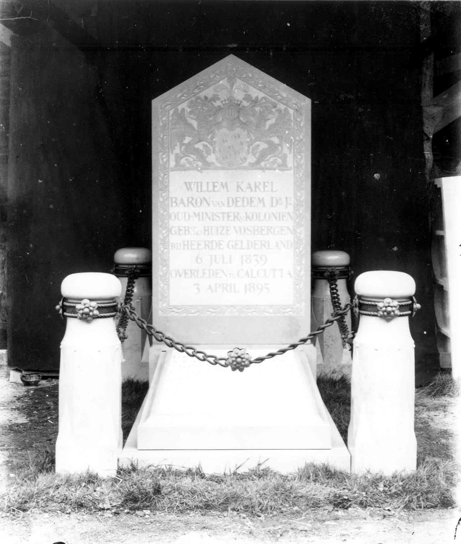 Grafmonument van Willem Karel van Dedem